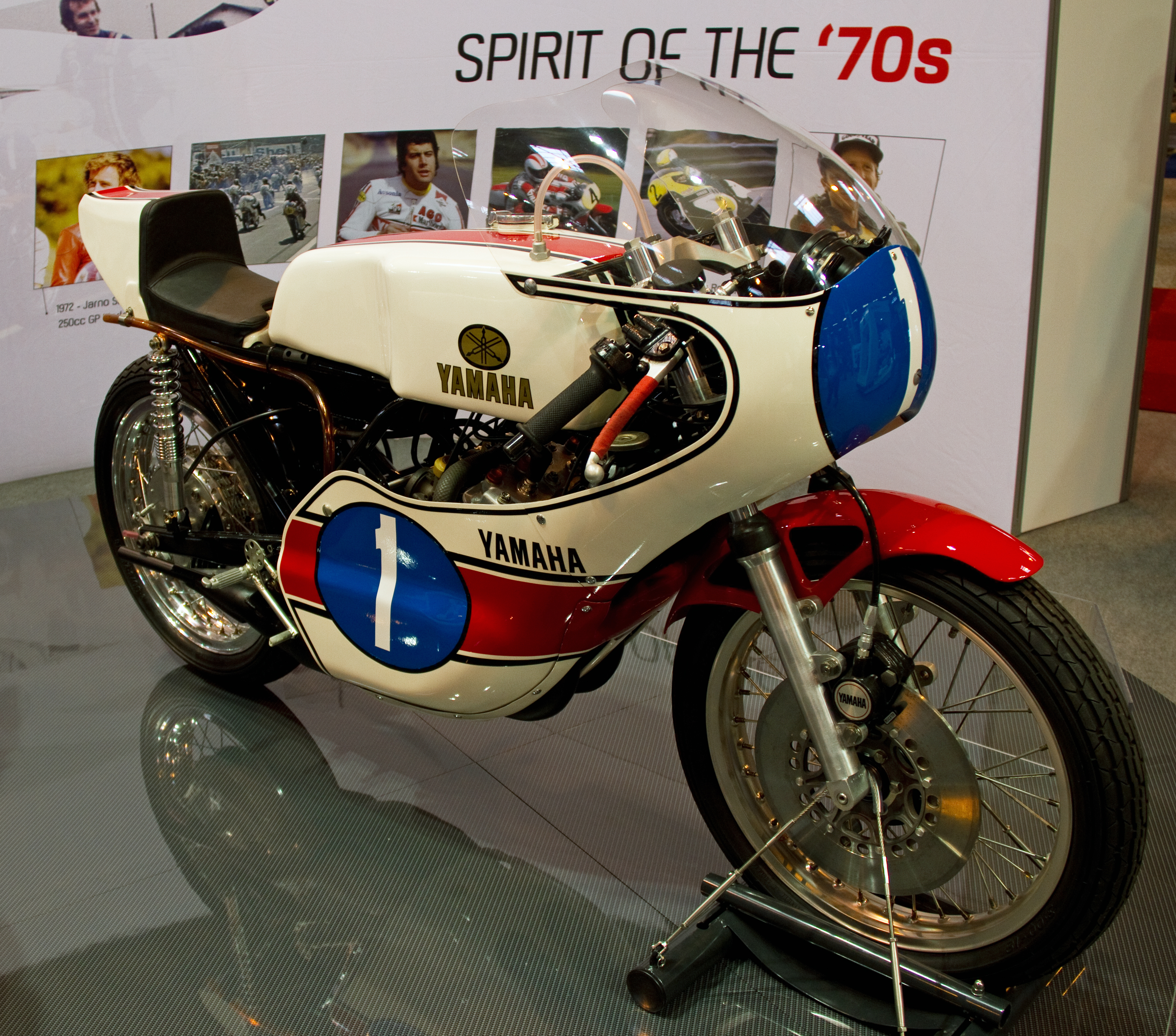 1974 Yamaha OW16 YZR350